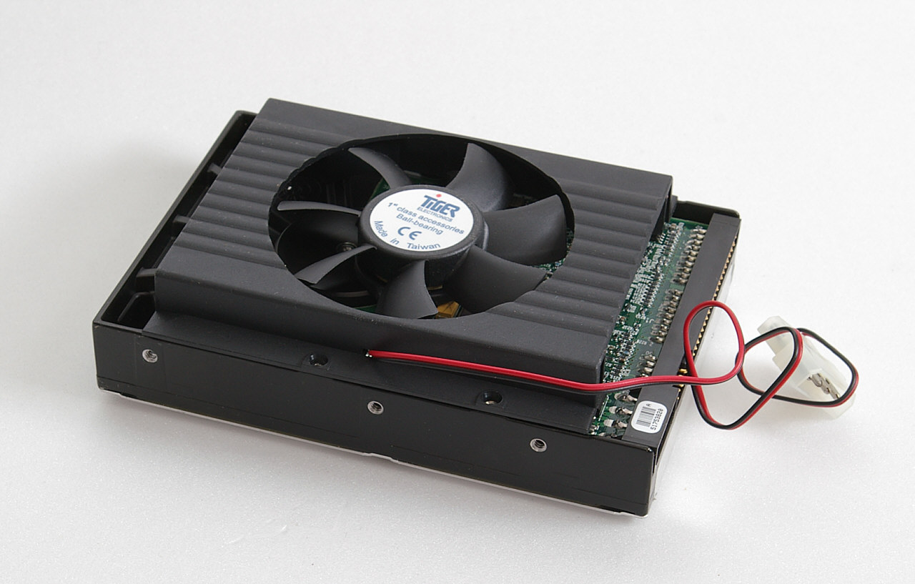 Luefter zur Festplattenkuehlung